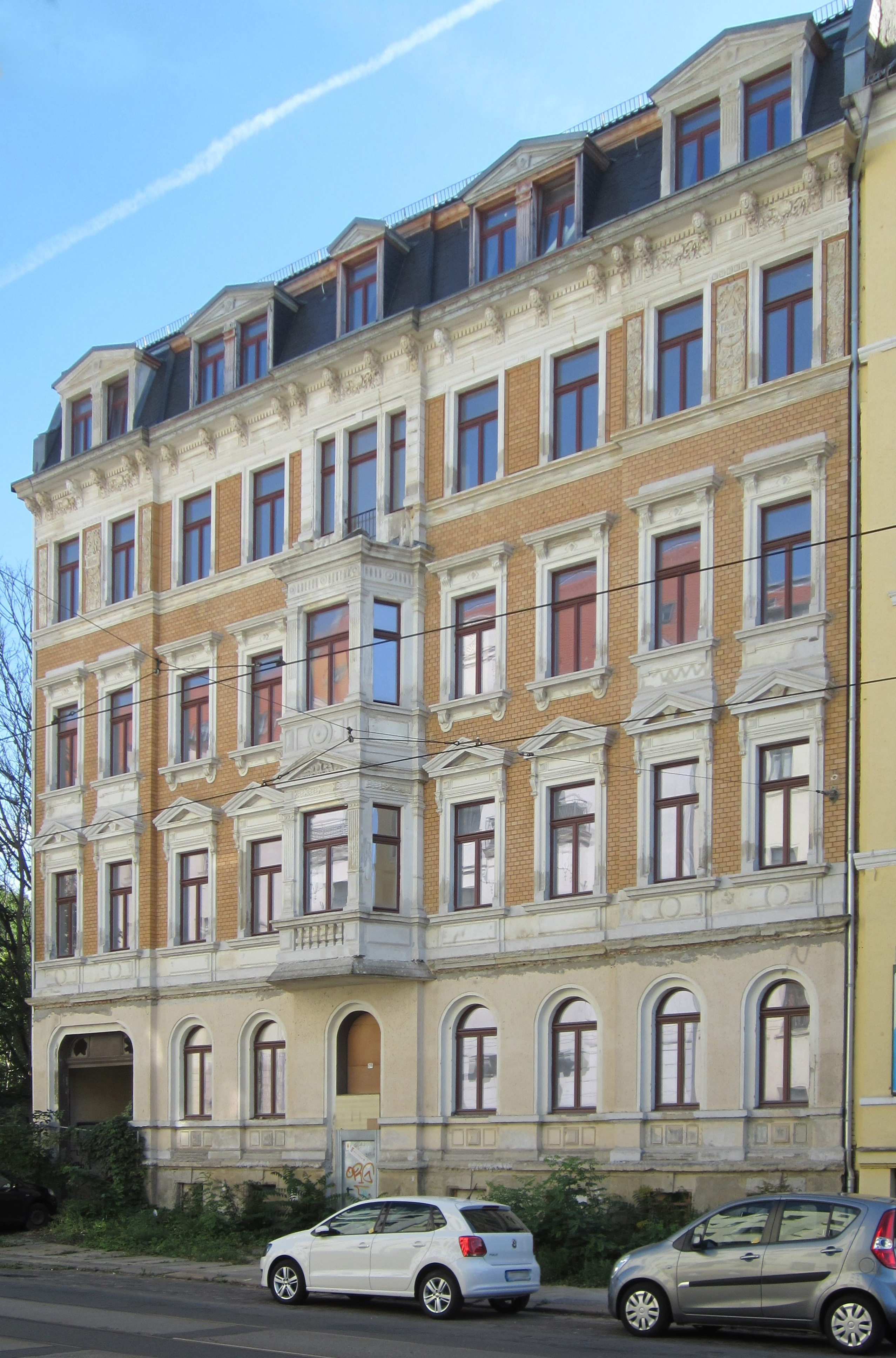 Kohlgartenstraße 20 in Leipzig; Denkmalbeschreibung: Mietshaus in ehemals geschlossener Bebauung mit Tordurchfahrt; Klinkerfassade mit Sandsteingliederung